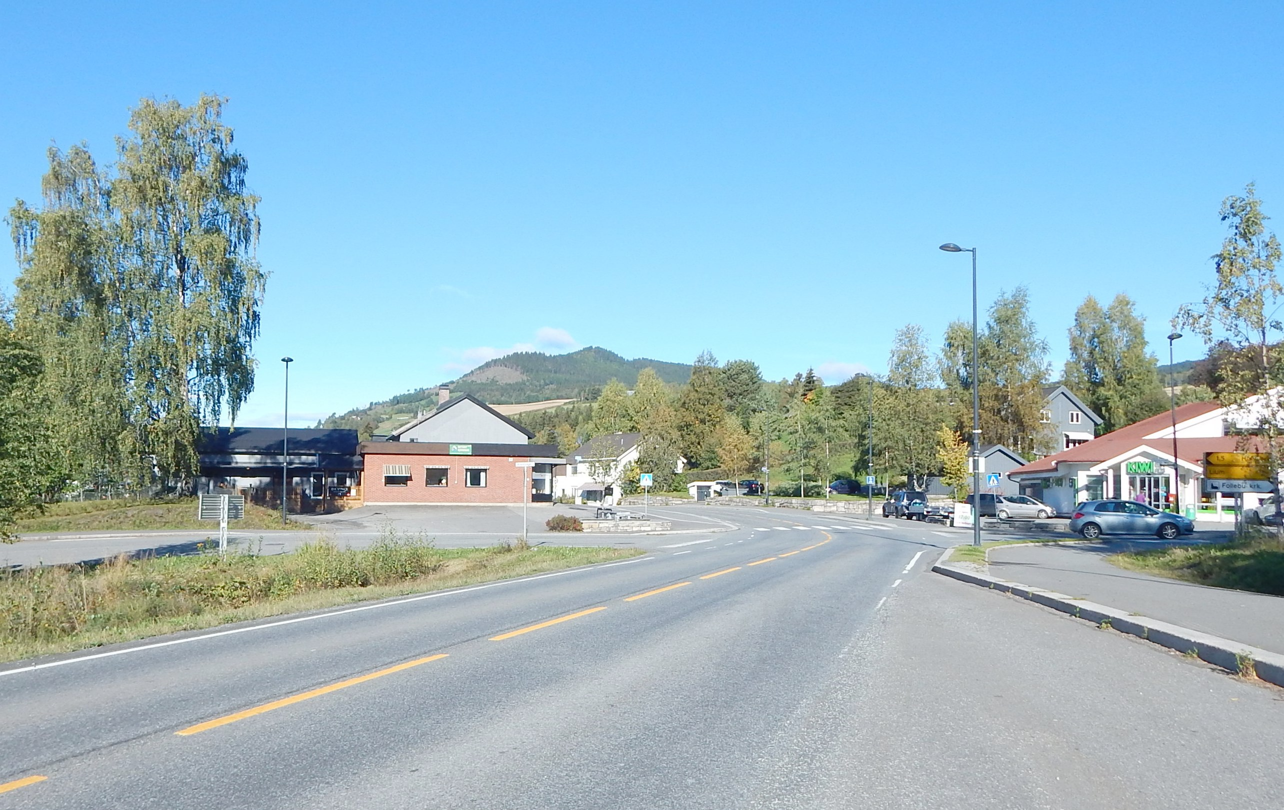 Fylkesvei 255 gjennom Follebu sentrum